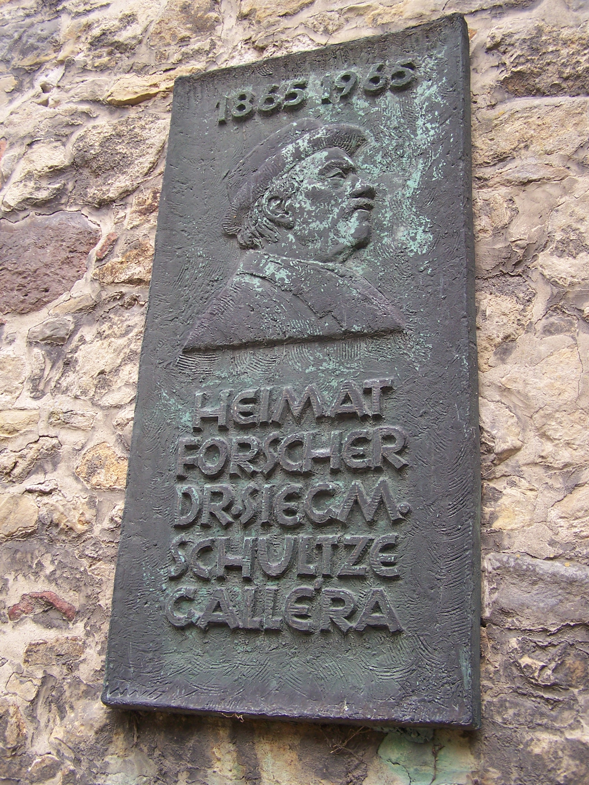 Gedenktafel für Siegmar Baron von Galléra, auch Schultze-Galléra, Schriftsteller und Heimatforscher, in der Kirchenruine Halle-Granau